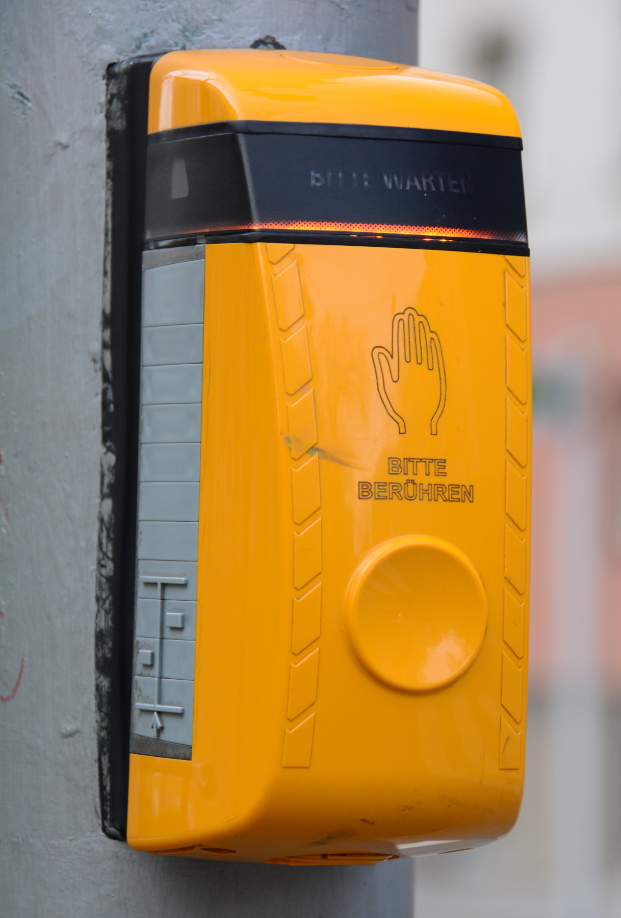 Schalter für Fußgängerampel in der Längenfeldgasse in Wien-Meidling. Das Relief links gibt Blinden und Sehbehinderten Auskunft über die Fahrbahnbreite (Anzahl der Fahrspuren).